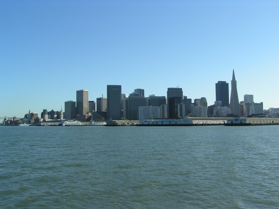 Skyline von San Francisco